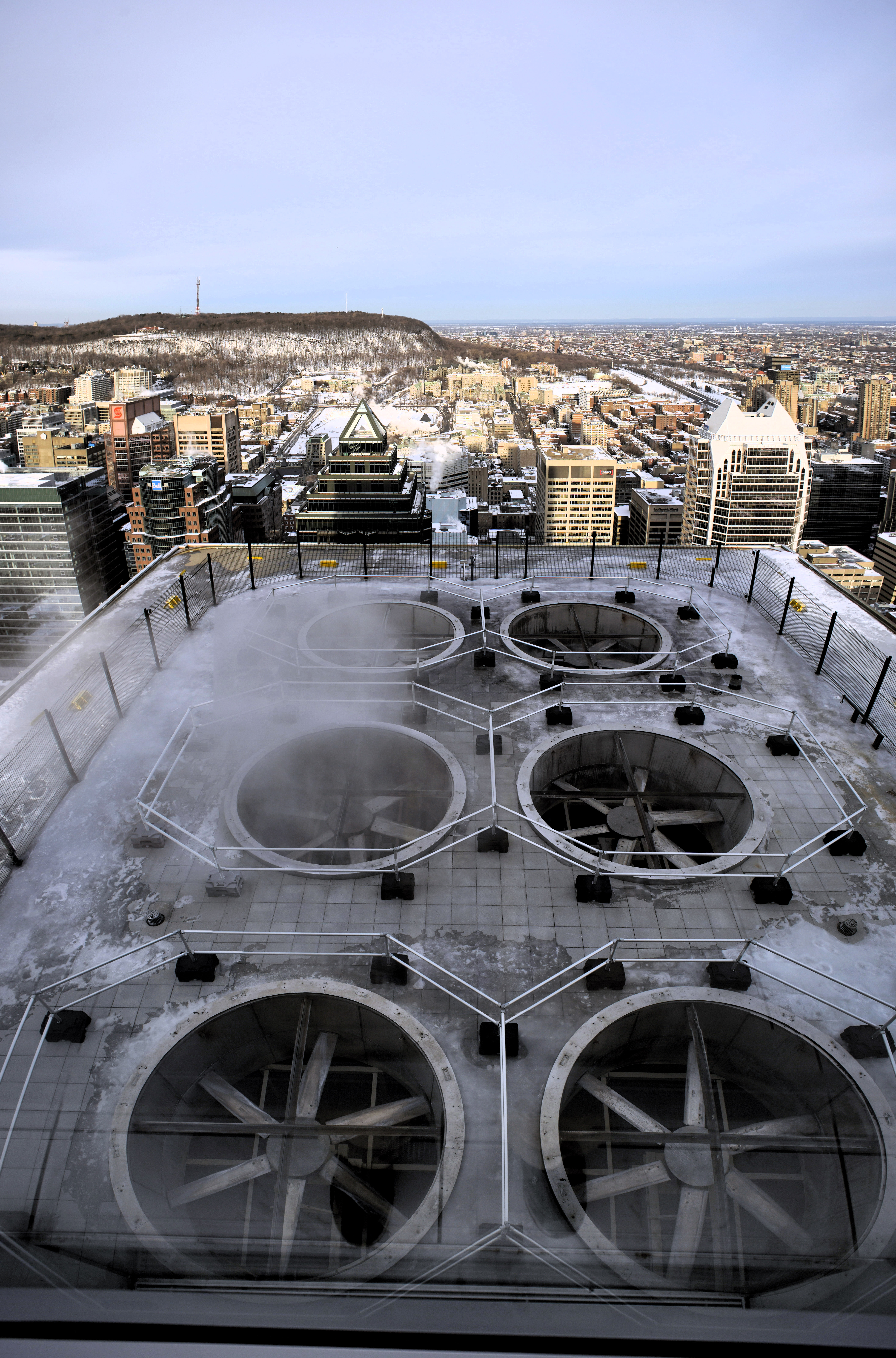 1, Place Ville Marie Montréal (Québec) H3B 2G2